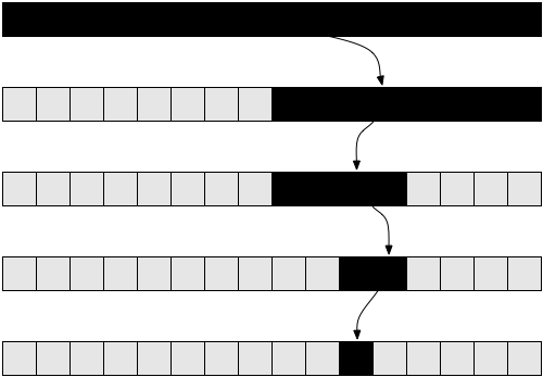 binarna pretraga